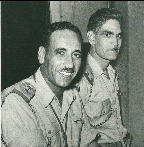 عبد الكريم قاسم وعبد السلام عارف